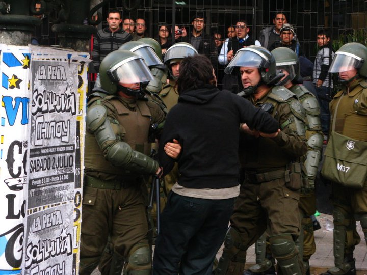 Carabineros llevando a alguna persona que participaba en la protesta